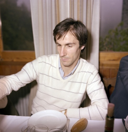 Alberto Gorriz in 1981